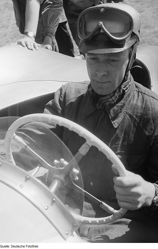 Original image description from the Deutsche Fotothek Portrait eines Automobilrennfahrers in seinem Wagen mit der Nummer 33 beim 6. Leipziger Stadtparkrennen